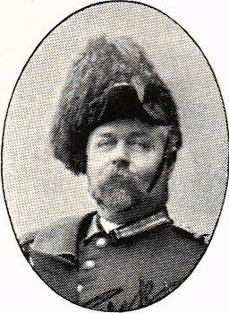 Frans Olof Ask (1857-1922), svensk ingenjör